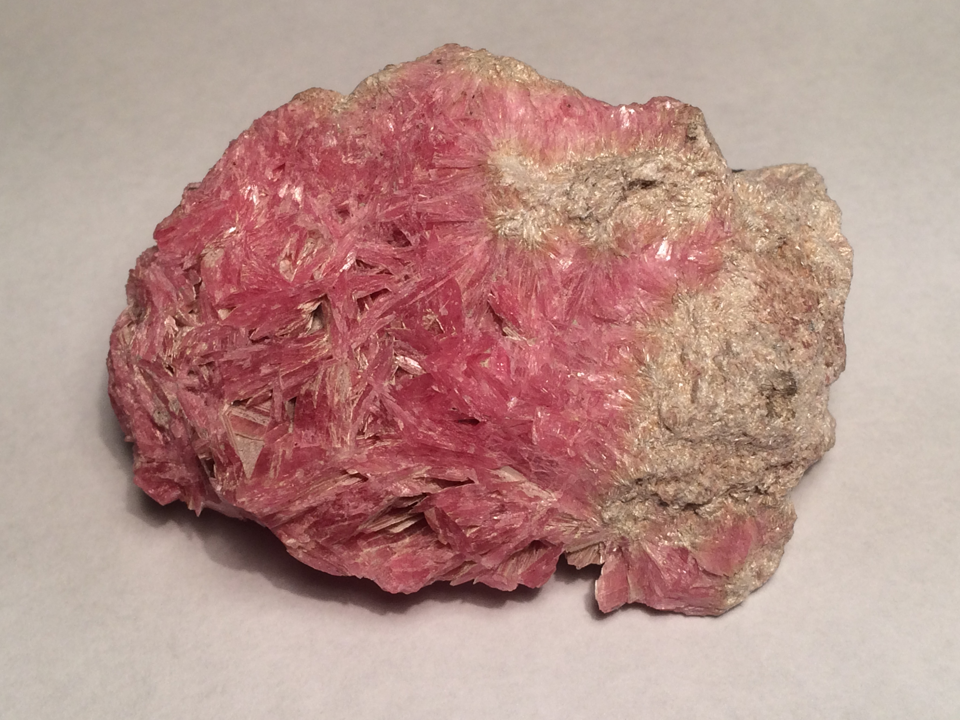 Rodonit z mé sbírky